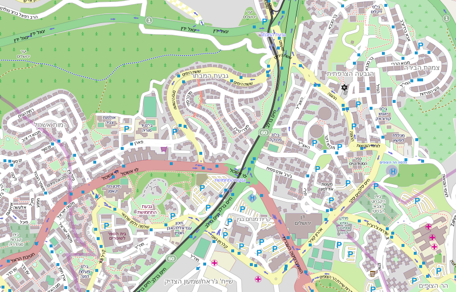 שכונות הבריח